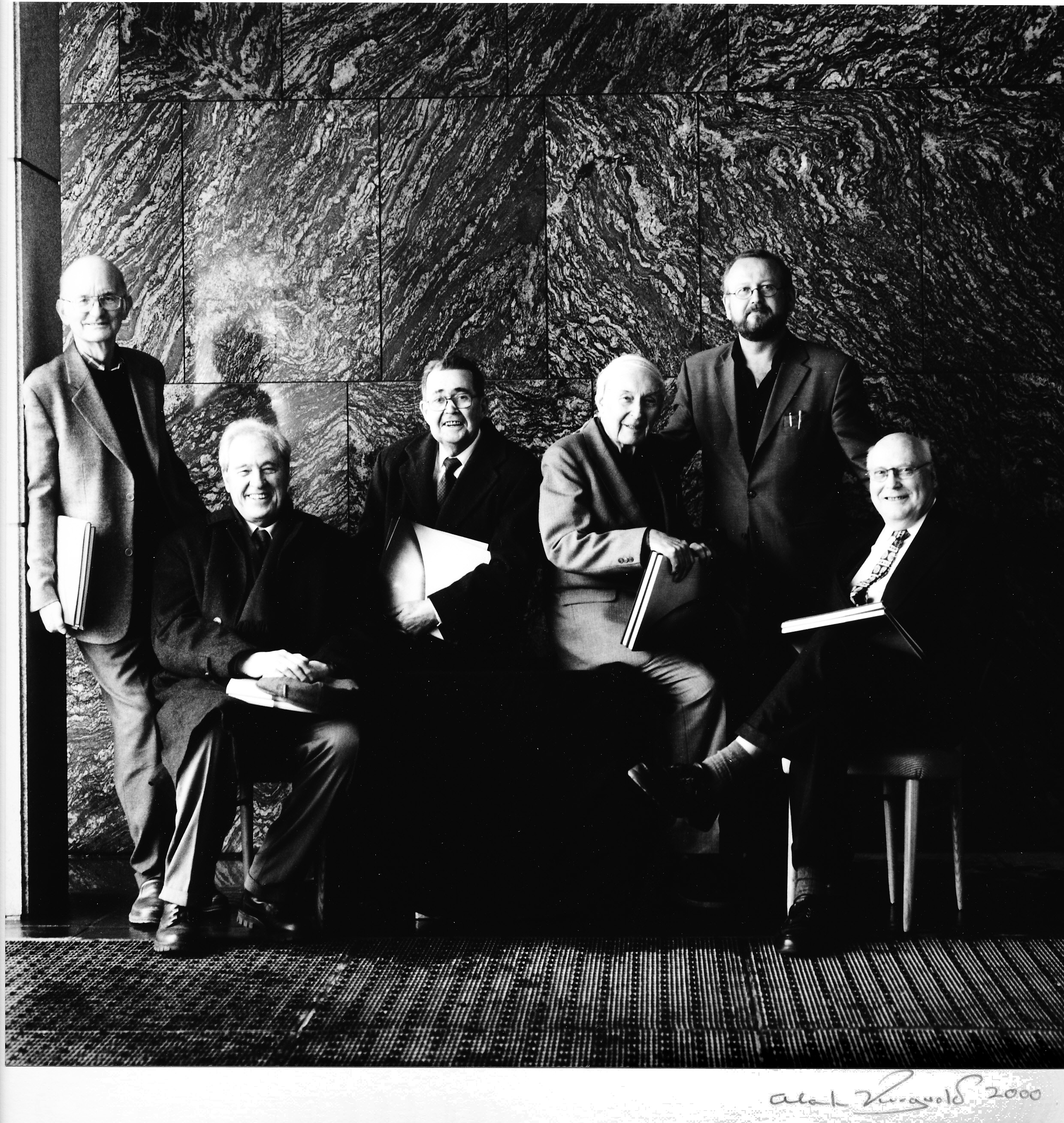 NRKs radiodirektører, fotografert i år 2000 Depicted people: Olav Nilssen, Halfdan Hegtun, Arne Bonde, Torolf Elster, Tor Fuglevik and Gunnar Gran